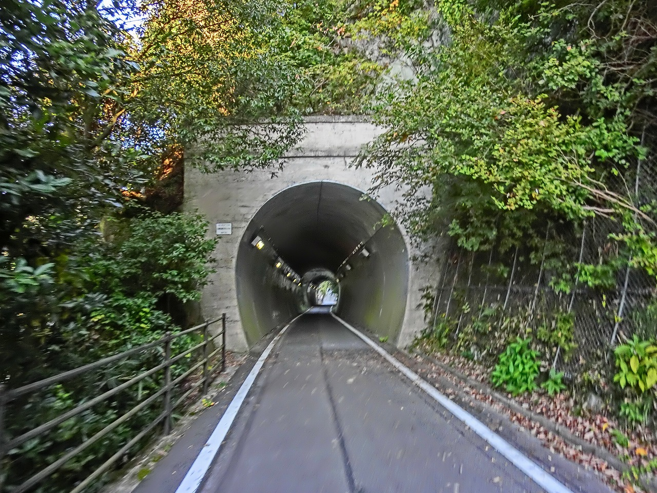 岡山県道703号備前柵原自転車道線-天神山トンネル1号2号 旧同和鉱業片上鉄道(岡山県）